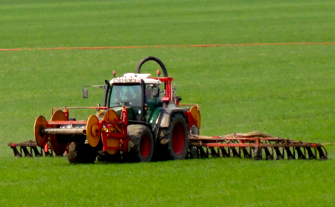 Gülleverschlauchung – Fendt-Vario-Traktor mit Schlauchhaspeln und Exaktverteiler, Carel Coenraadpolder, Groningen, Niederlande